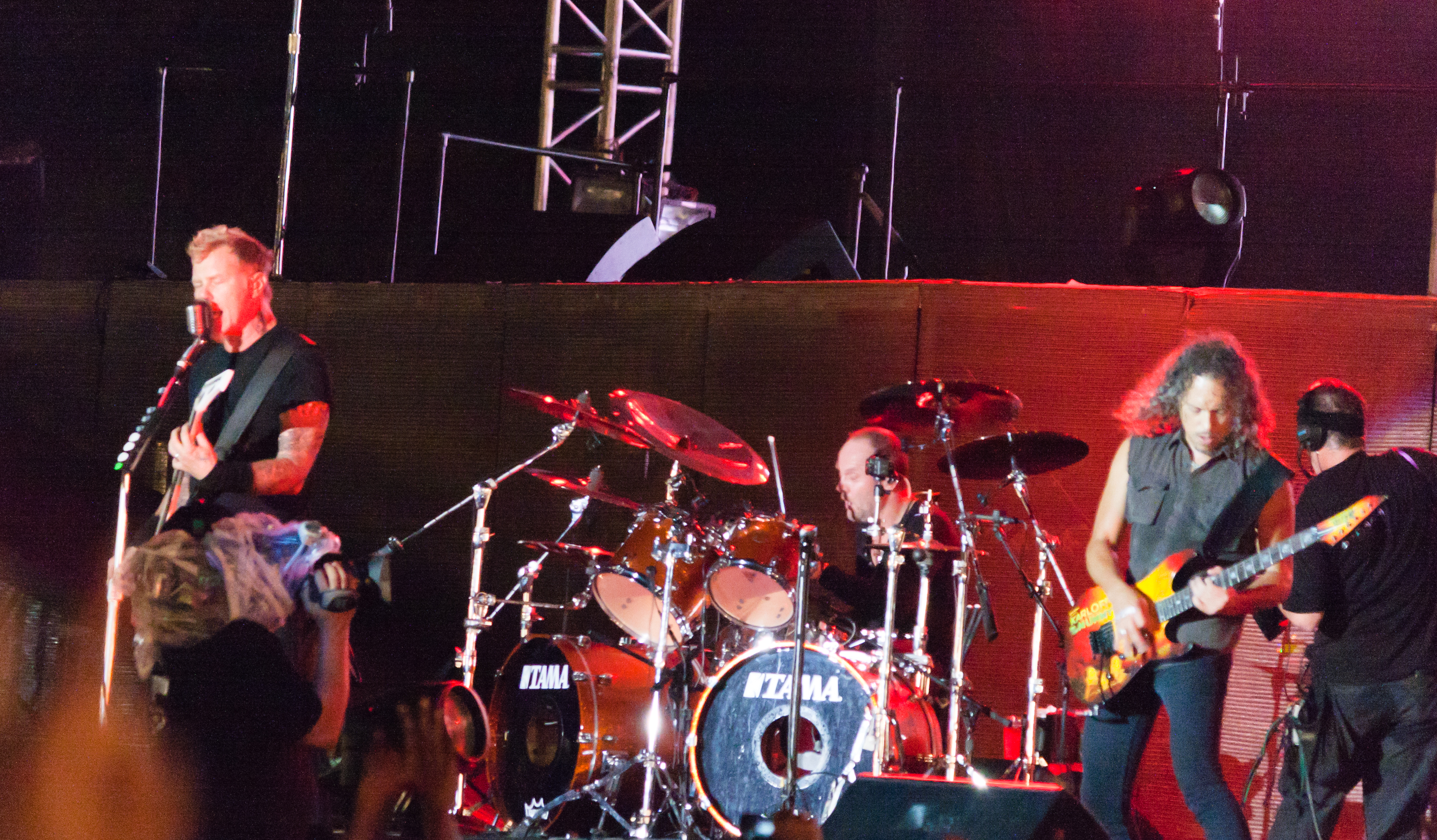 Metallica @Banglore